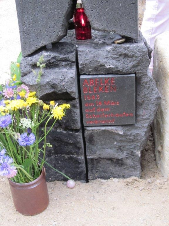 Gedenkstein für Abelke Bleken, die 1583 wegen angeblicher Hexerei in Hamburg hingerichtet worden ist. Der Gedenkstein wurde 2015 im Garten der Frauen auf dem Friedhof Ohlsdorf aufgestellt.